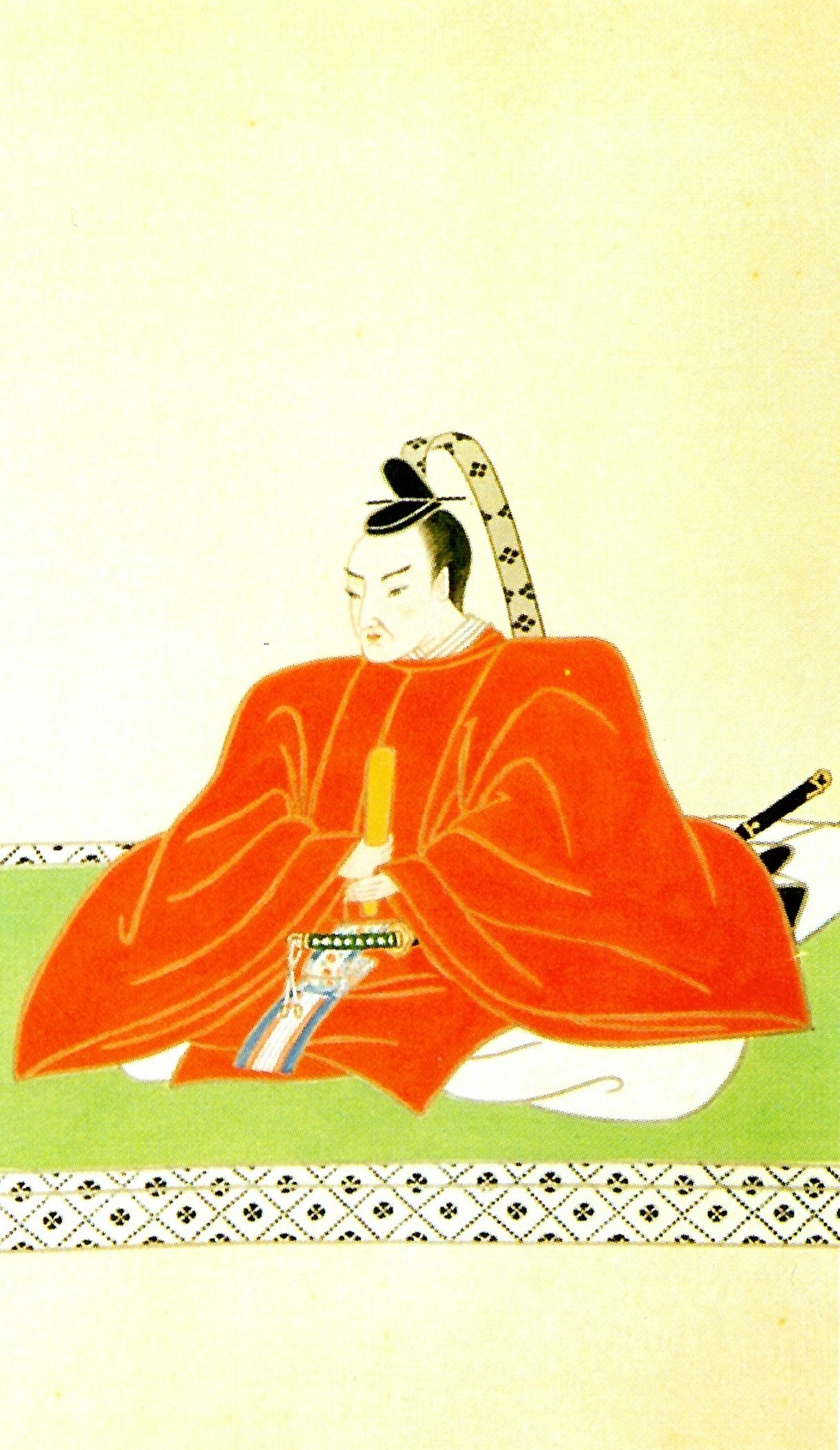 戸田氏鉄の肖像。